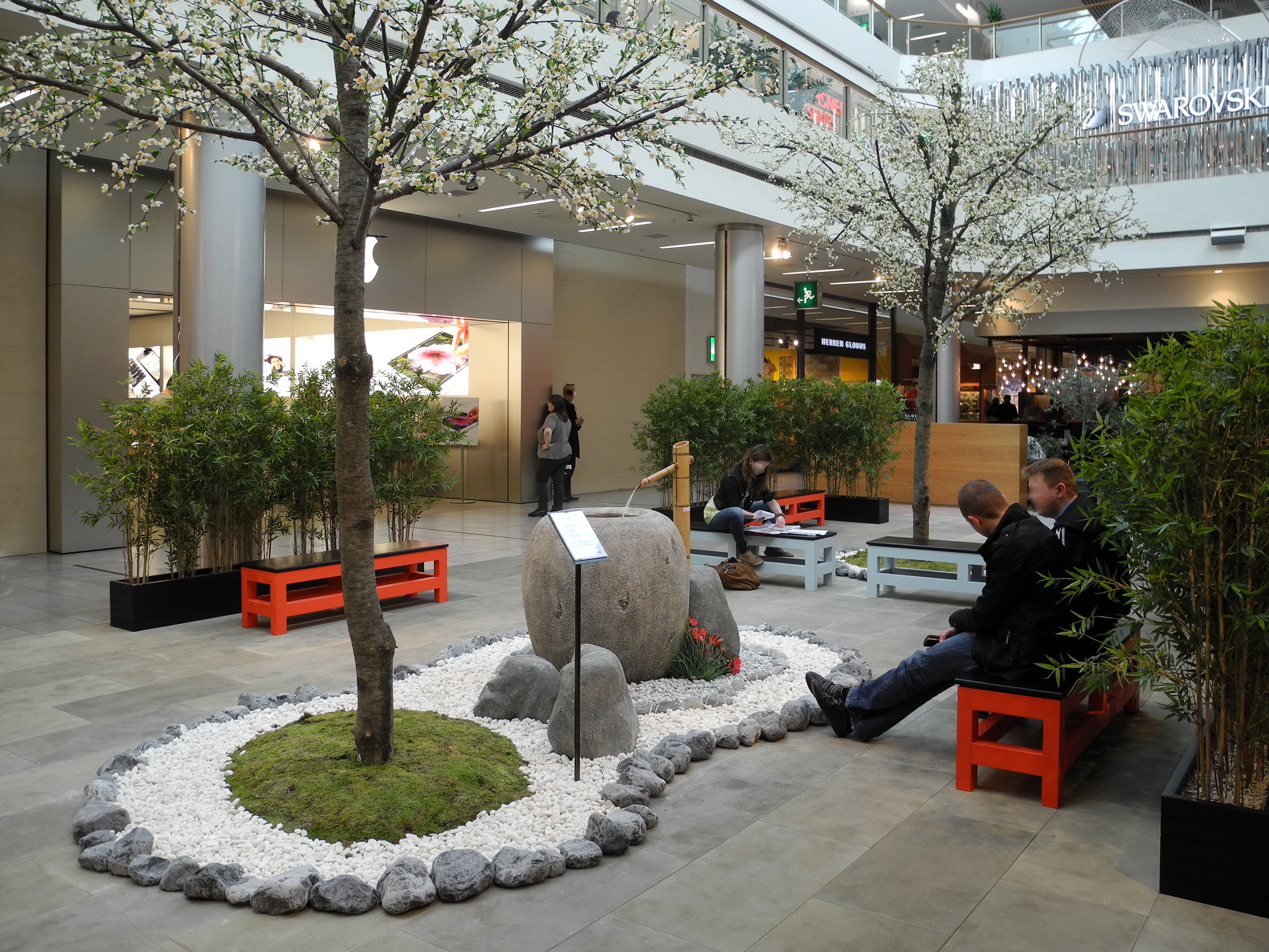 Hanami, Glattzentrum in Wallisellen (Switzerland)